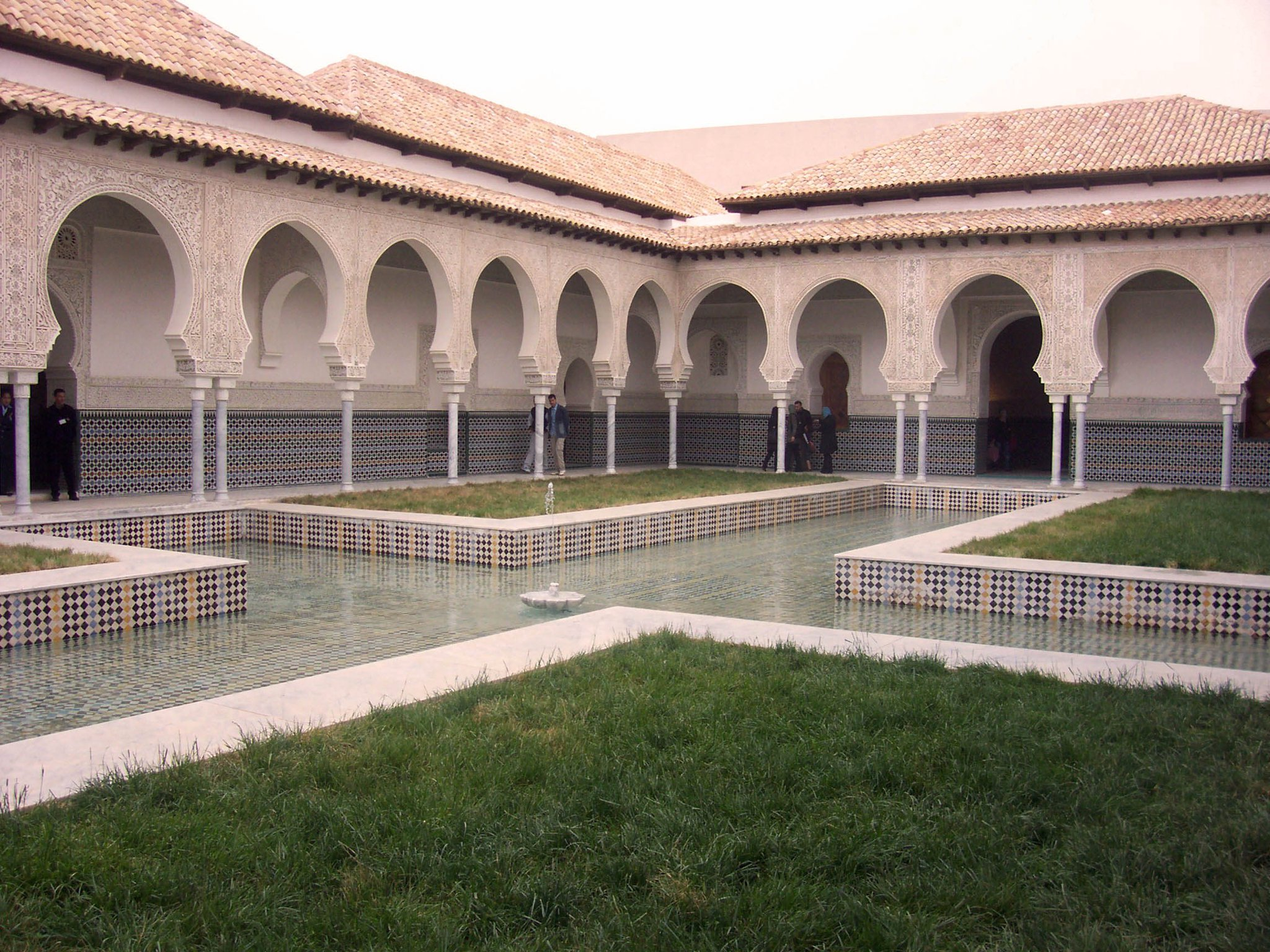 Inside palace El Mechouar